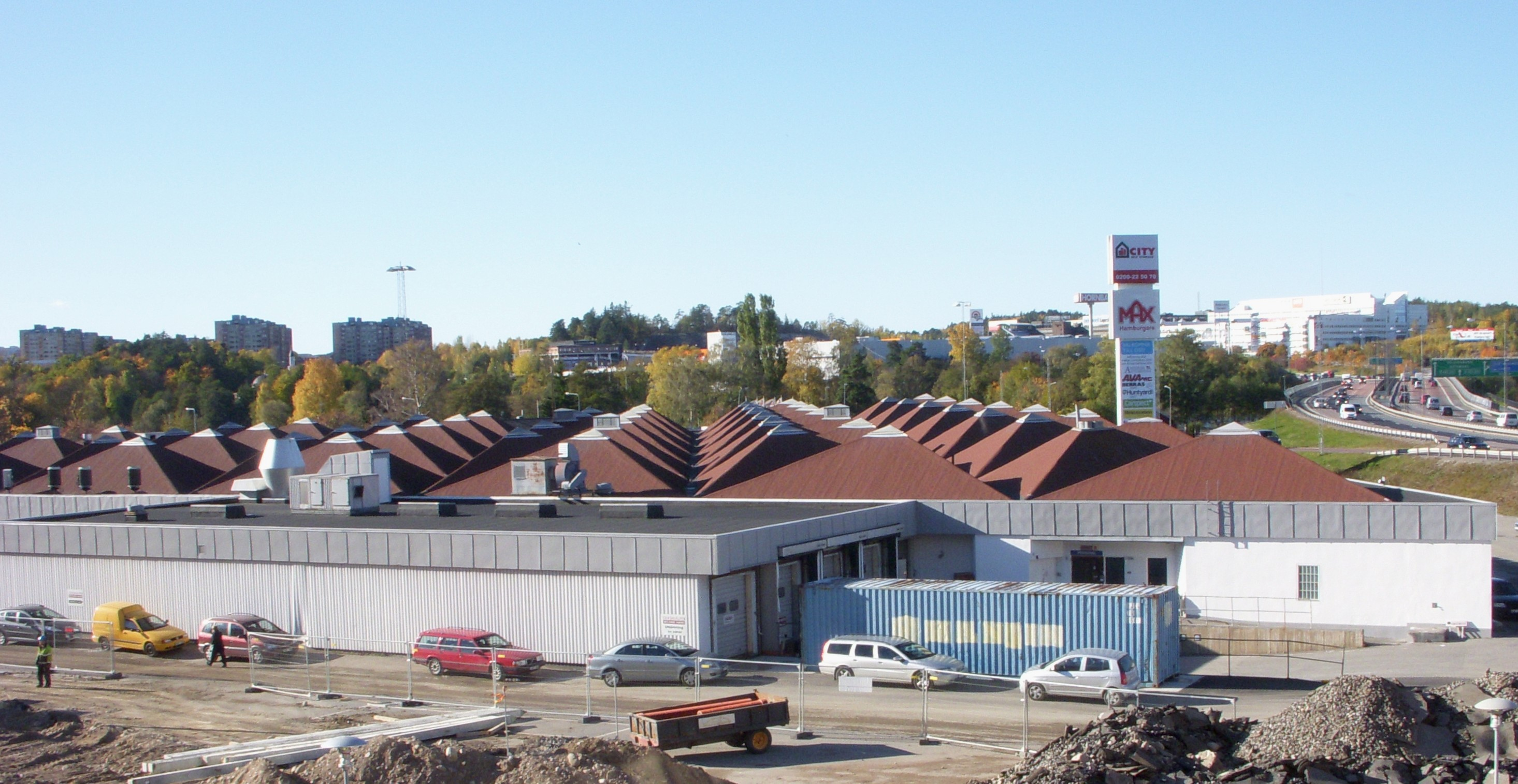 OBS! Vårby (KF:s rabattvaruhus)